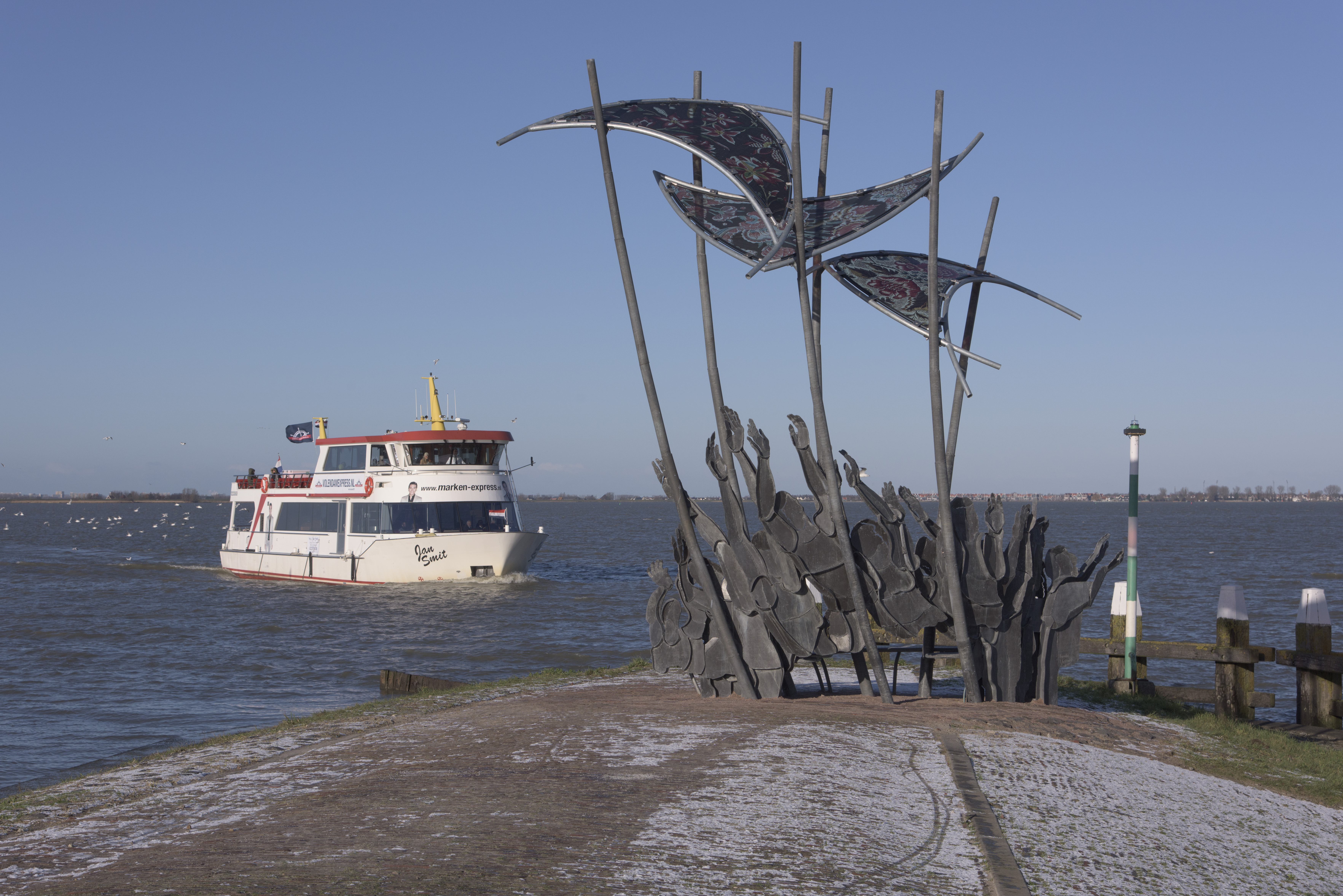 Monument watersnood 1916 geplaatst 2016 aan de haven te Marken, NL